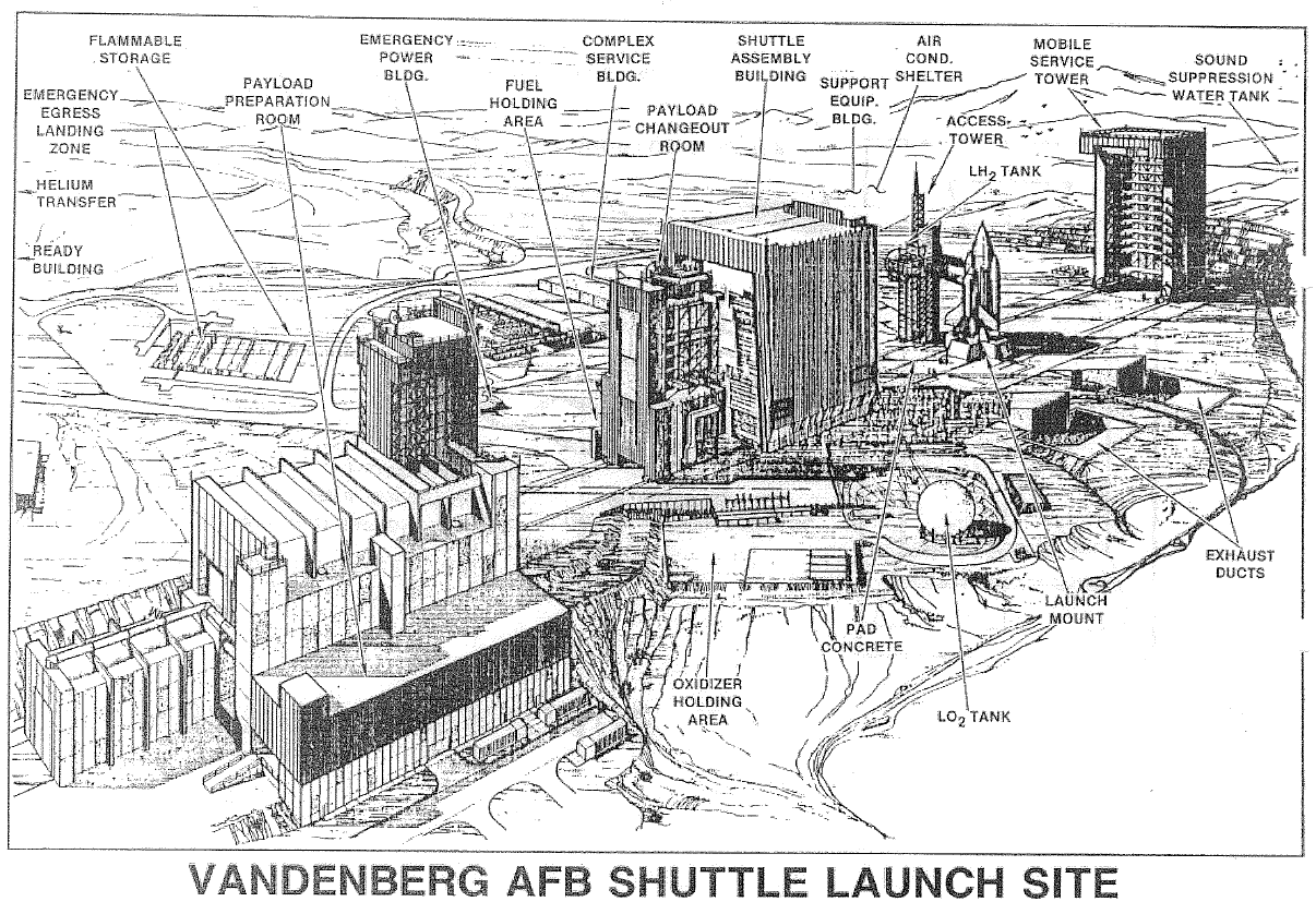 Vandenberg AFB Shuttle Launch Site